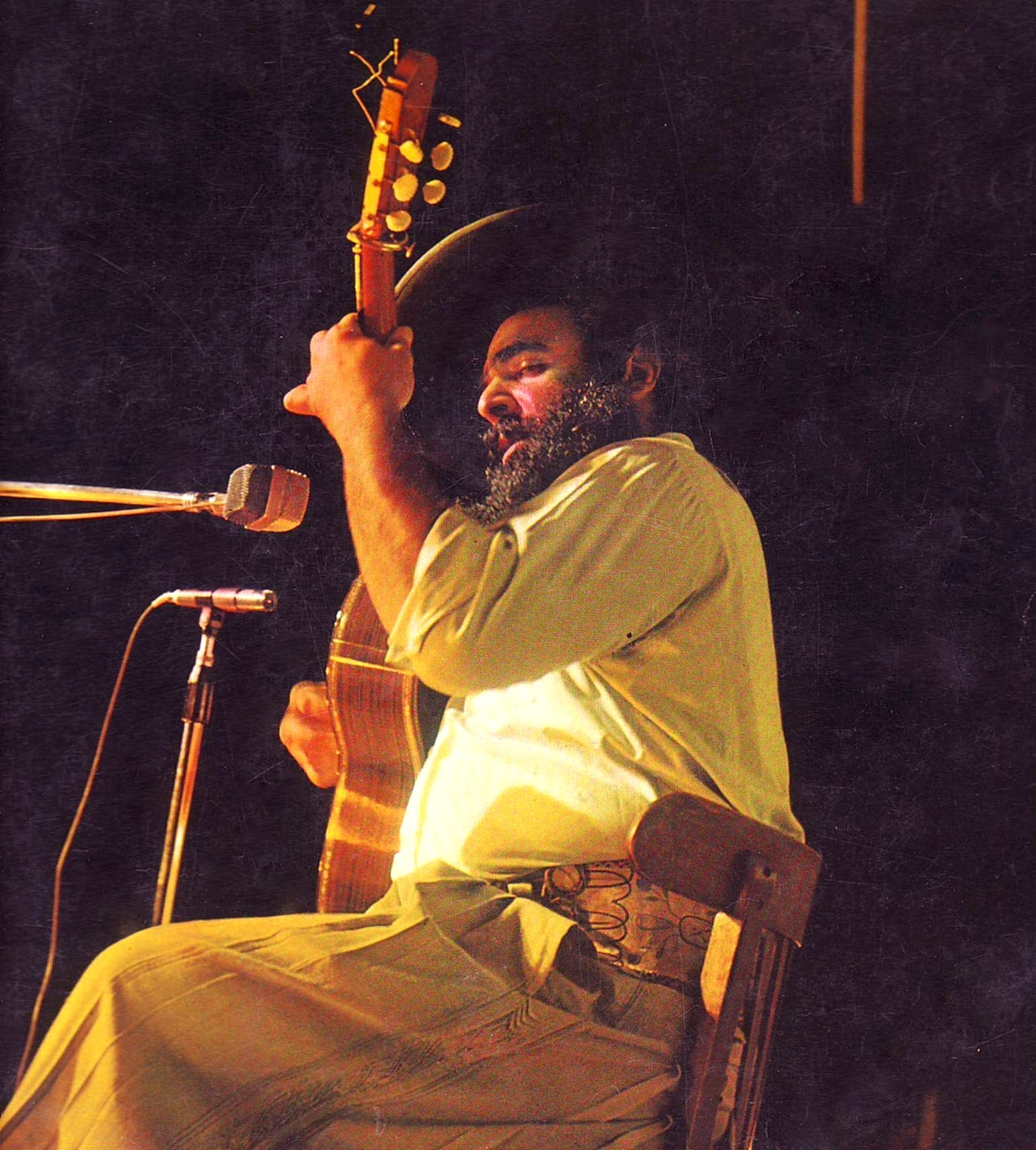 Escaneo del álbum "Lo mejor de Jorge Cafrune", editado en vinilo en 1976